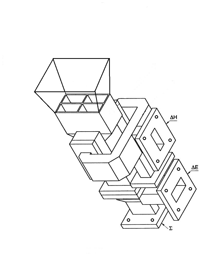 Облучатель остронаправленной параболической антенны